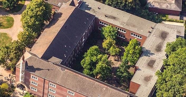 Luftbild des Städtischen Gymnasiums Herten.